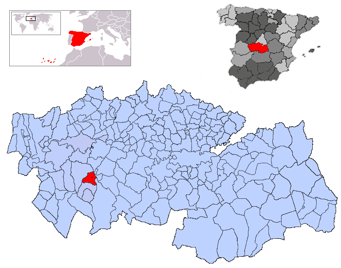 Retamoso de la Jara en la provincia de Toledo